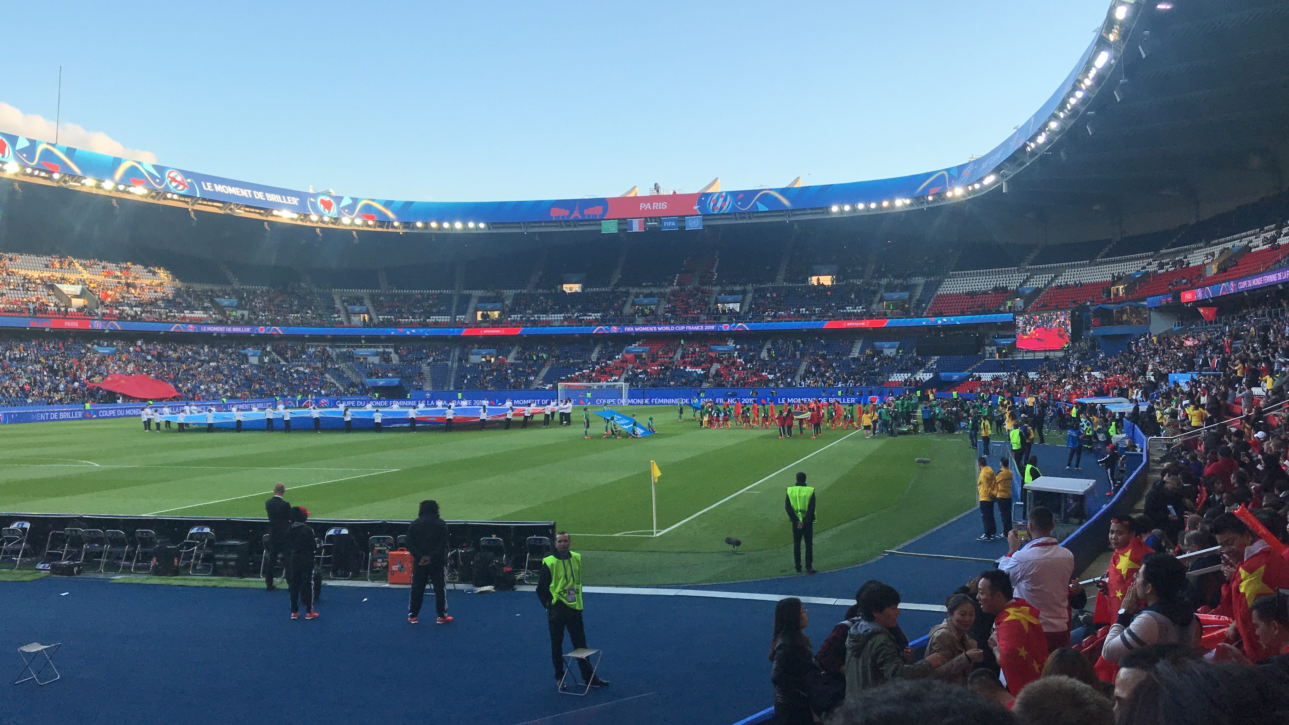 Afrique du Sud-Chine FIFA WWC Parc des Princes